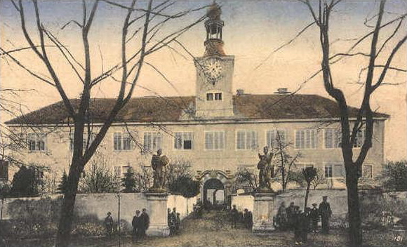 Kounice, zámek, před rokem 1926, dobová pohlednice.